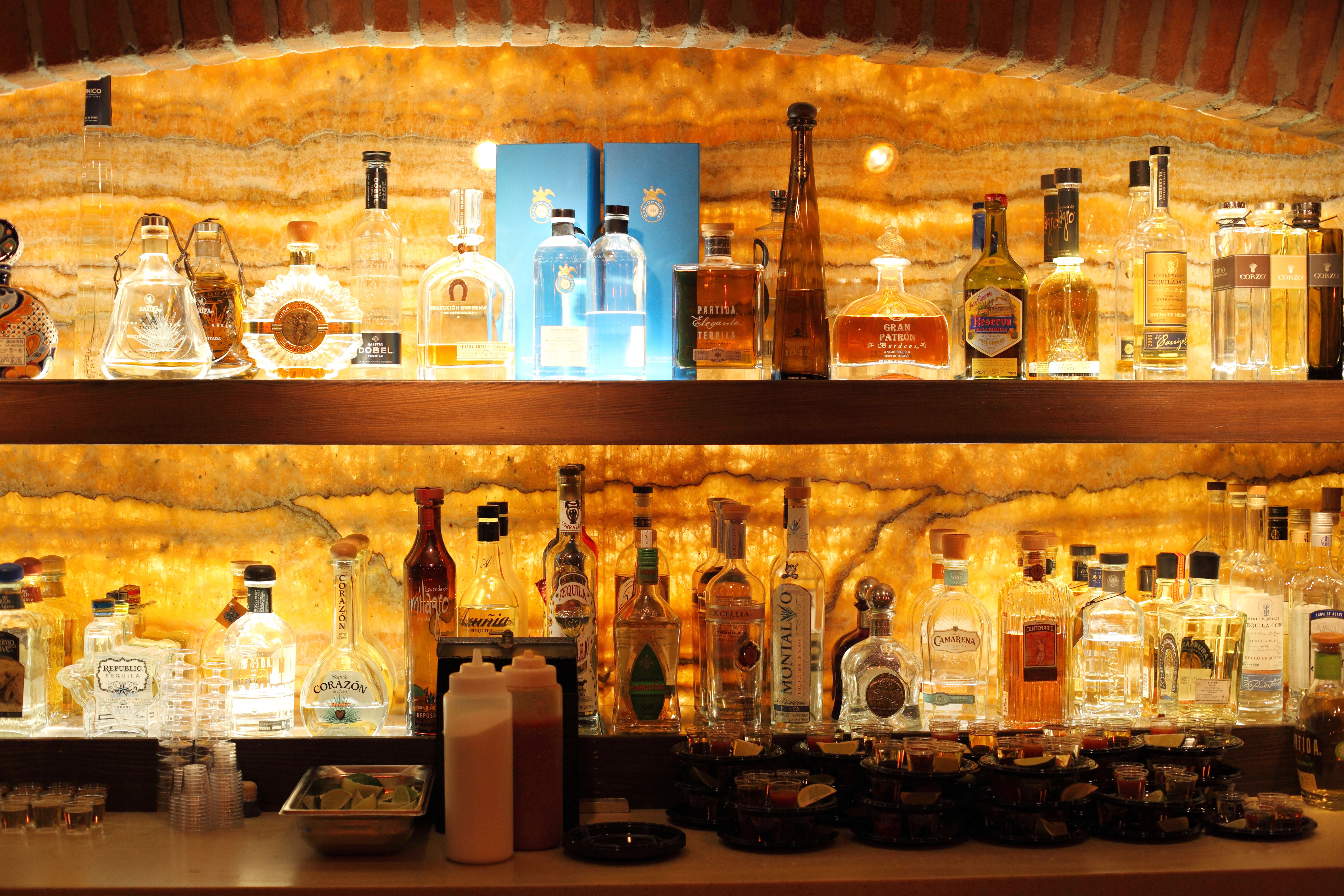 Cava Del Tequila in Mexico Pavilion at Epcot.